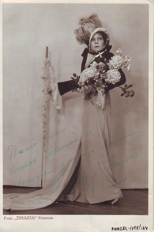 Marijona Rakauskaitė (1892–1975 m.) – lietuvių aktorė, sukūrusi apie 30 vaidmenų. Fotografijoje vaidmuo Pučinio operoje "Toska".